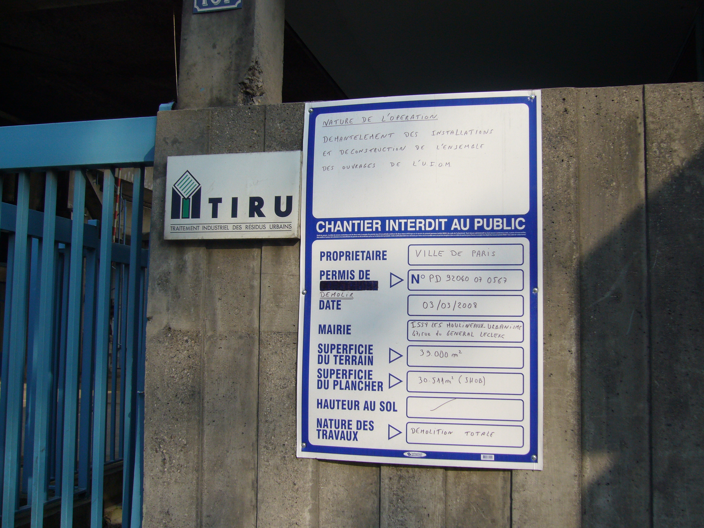 Permis de démolir accordé pour la démolition de l'usine de traitement des déchets TIRU.